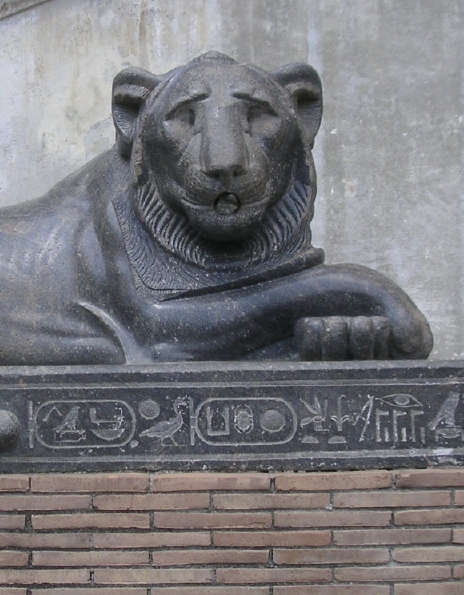 Statue d'un lion inscrite au nom de Nectanébo Ier - XXXe dynastie égyptienne - Museo Gregoriano du Vatican - Rome